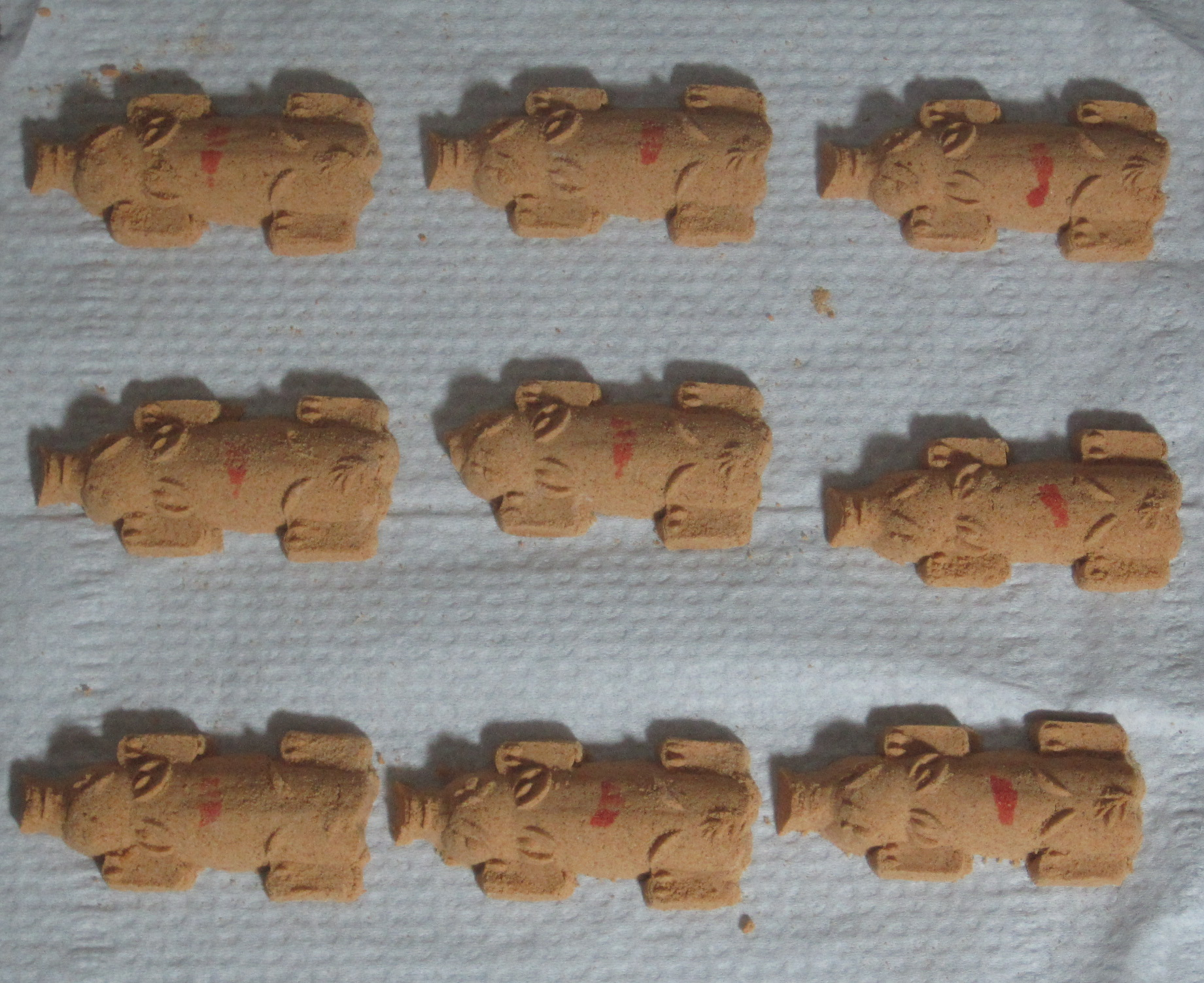 臺南水仙宮市場新永珍餅舖的「九豬」。